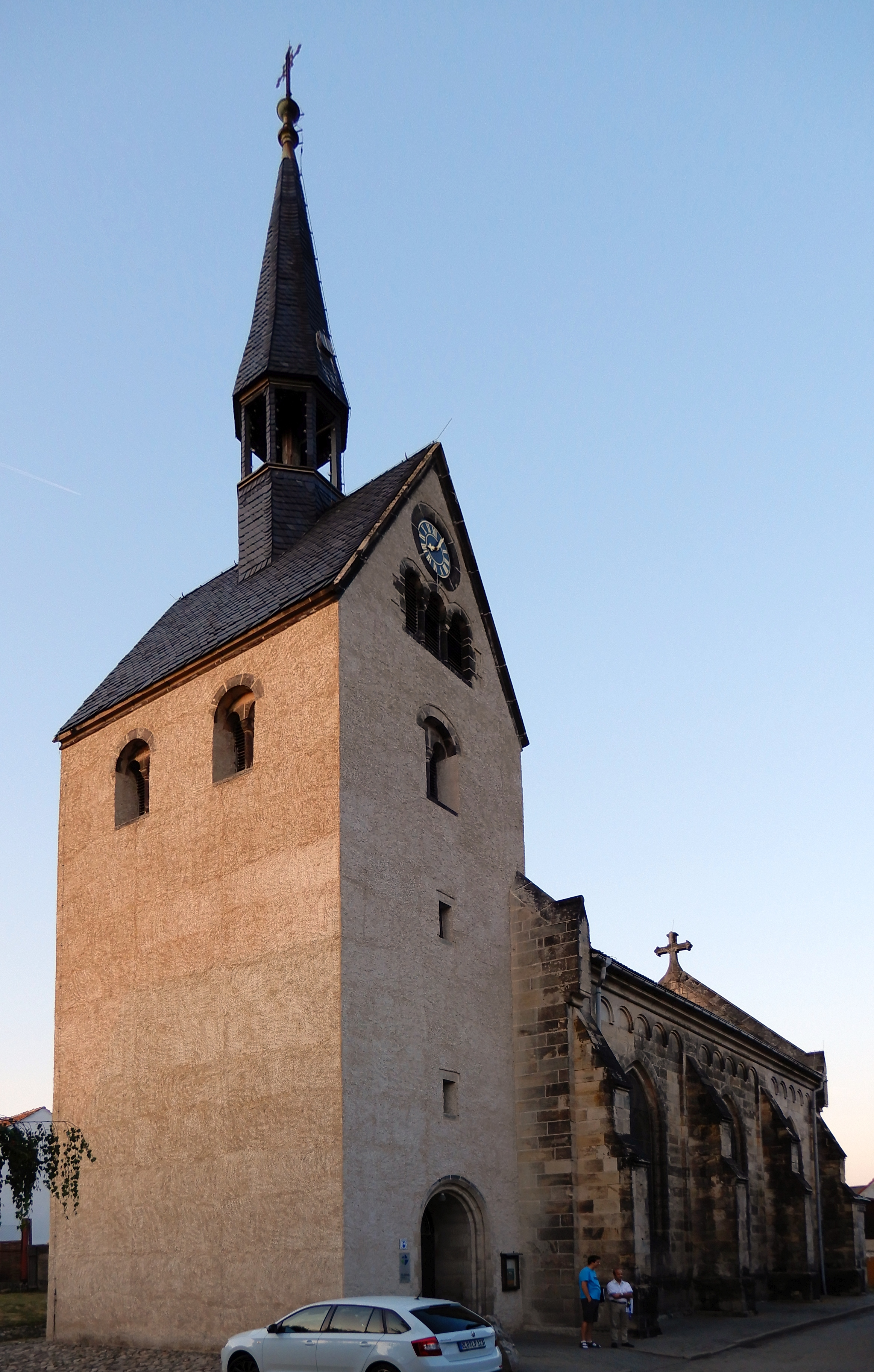 Kirche St. Georg, Warnstedt